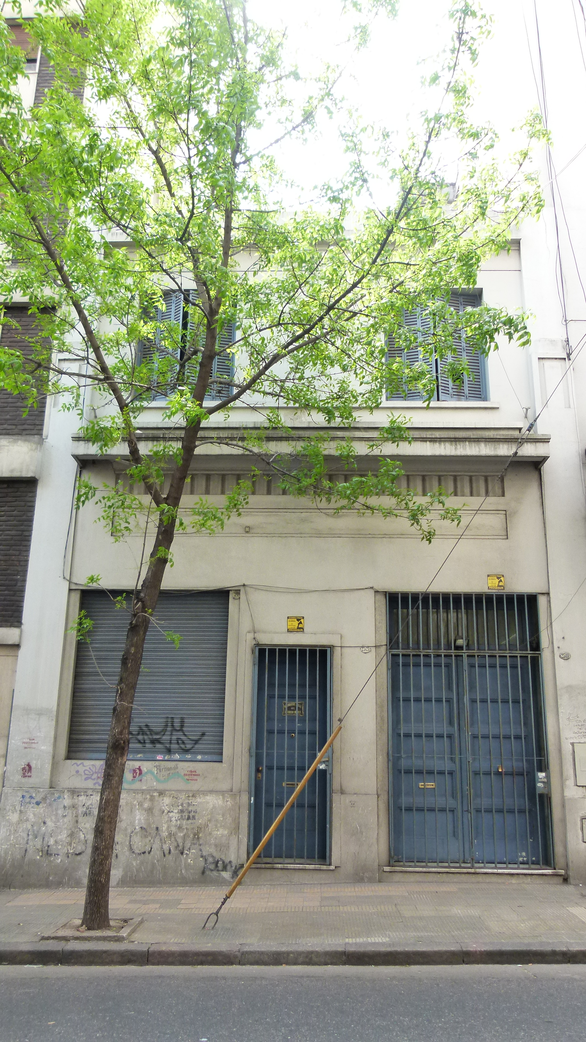 Estudios ION S.A.